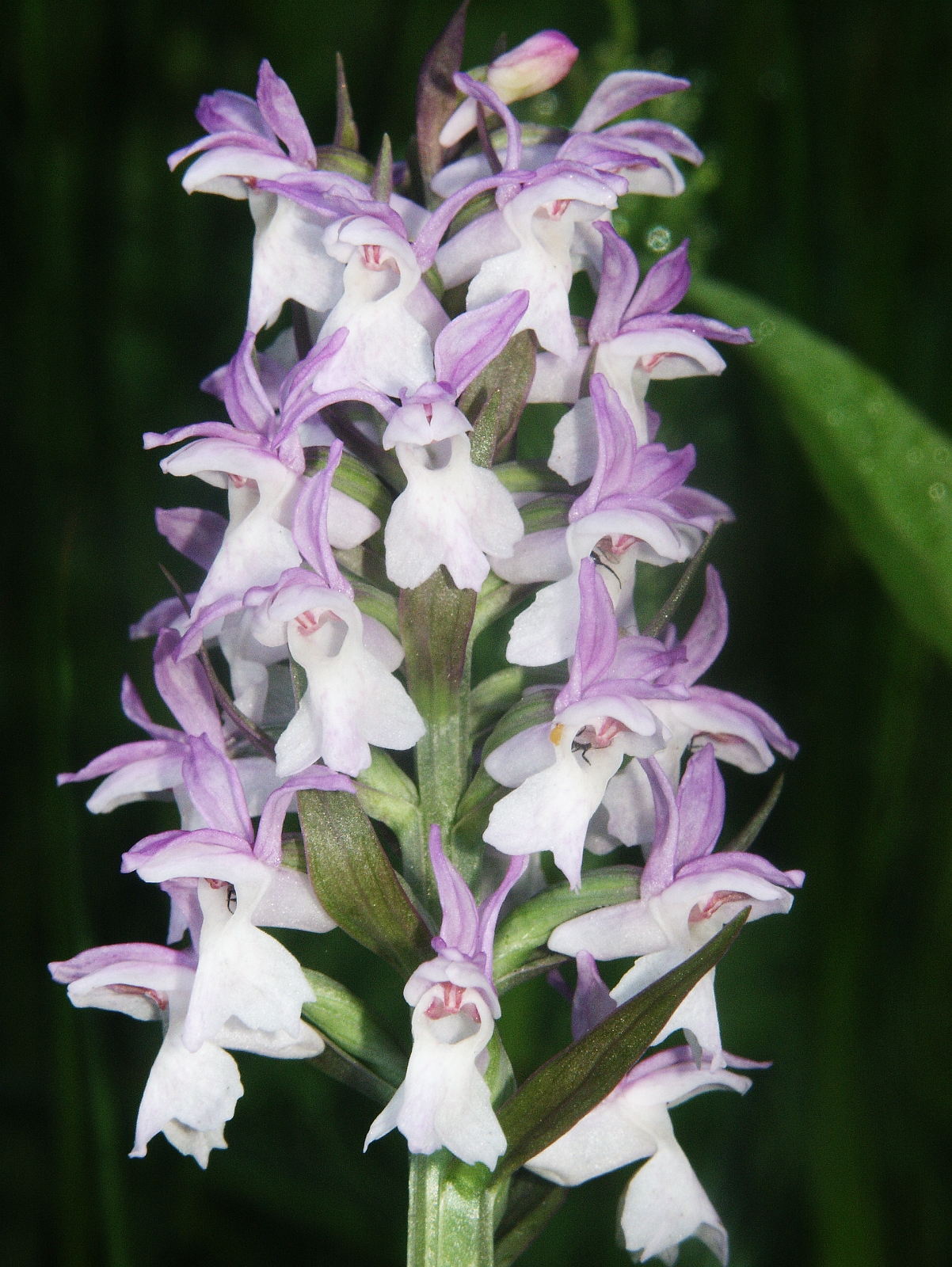 Dactylorhiza majalis, Schwäbisch-Fränkischer Wald, Germany